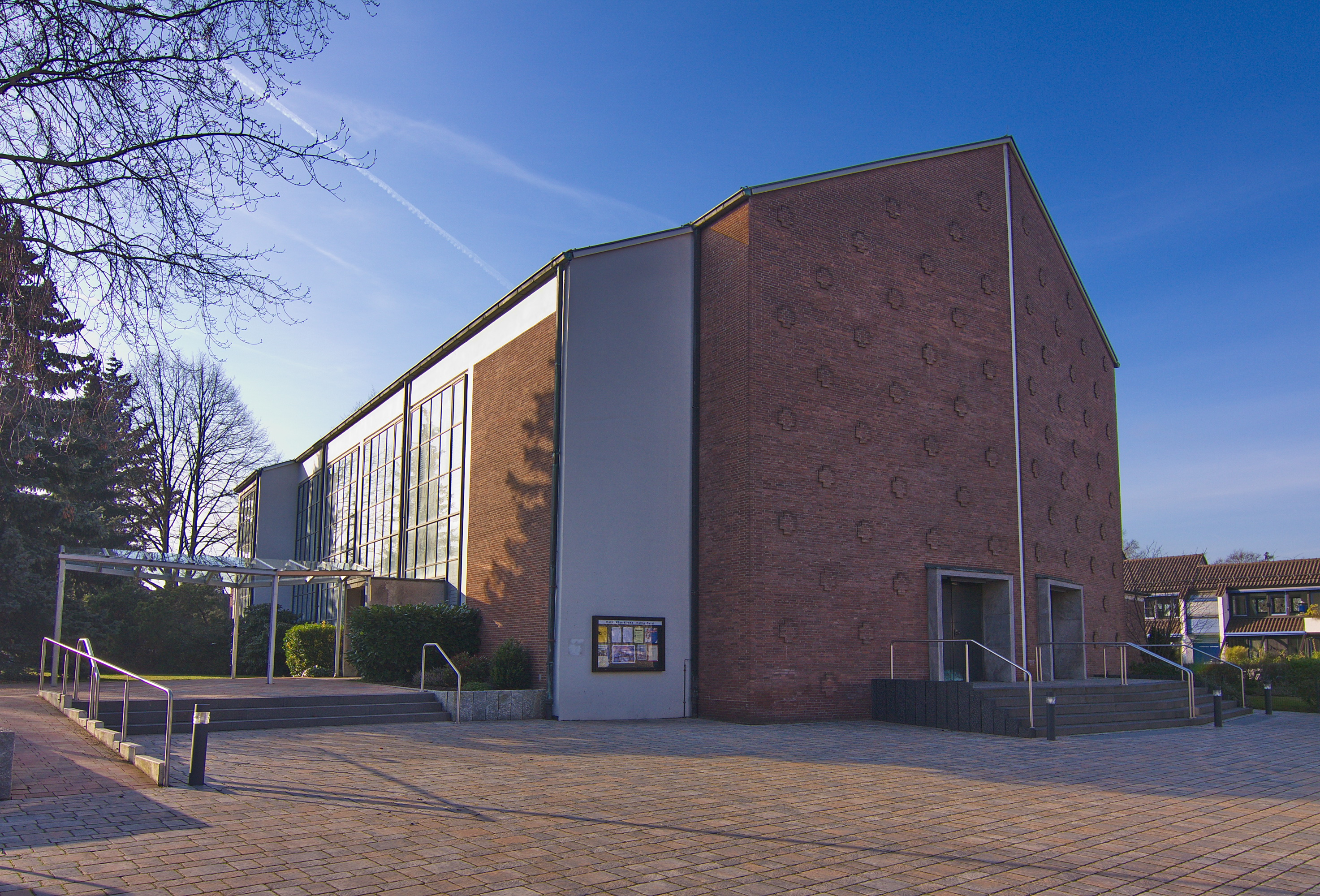 Heilig-Geist-Kirche in Bothfeld (Hannover), Niedersachsen, Deutschland